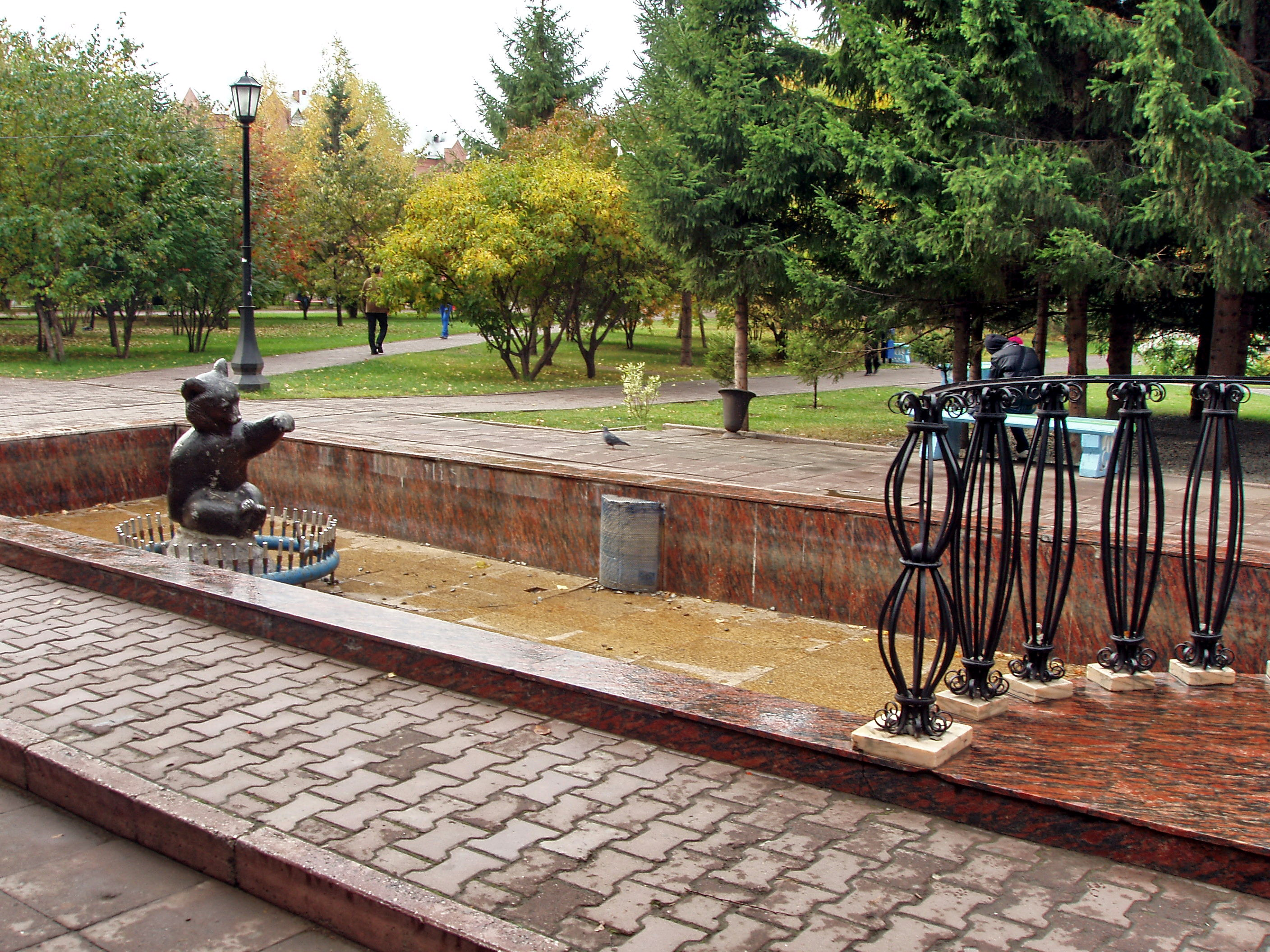 Детский фонтан с мишкой в Первомайском сквере Новосибирска